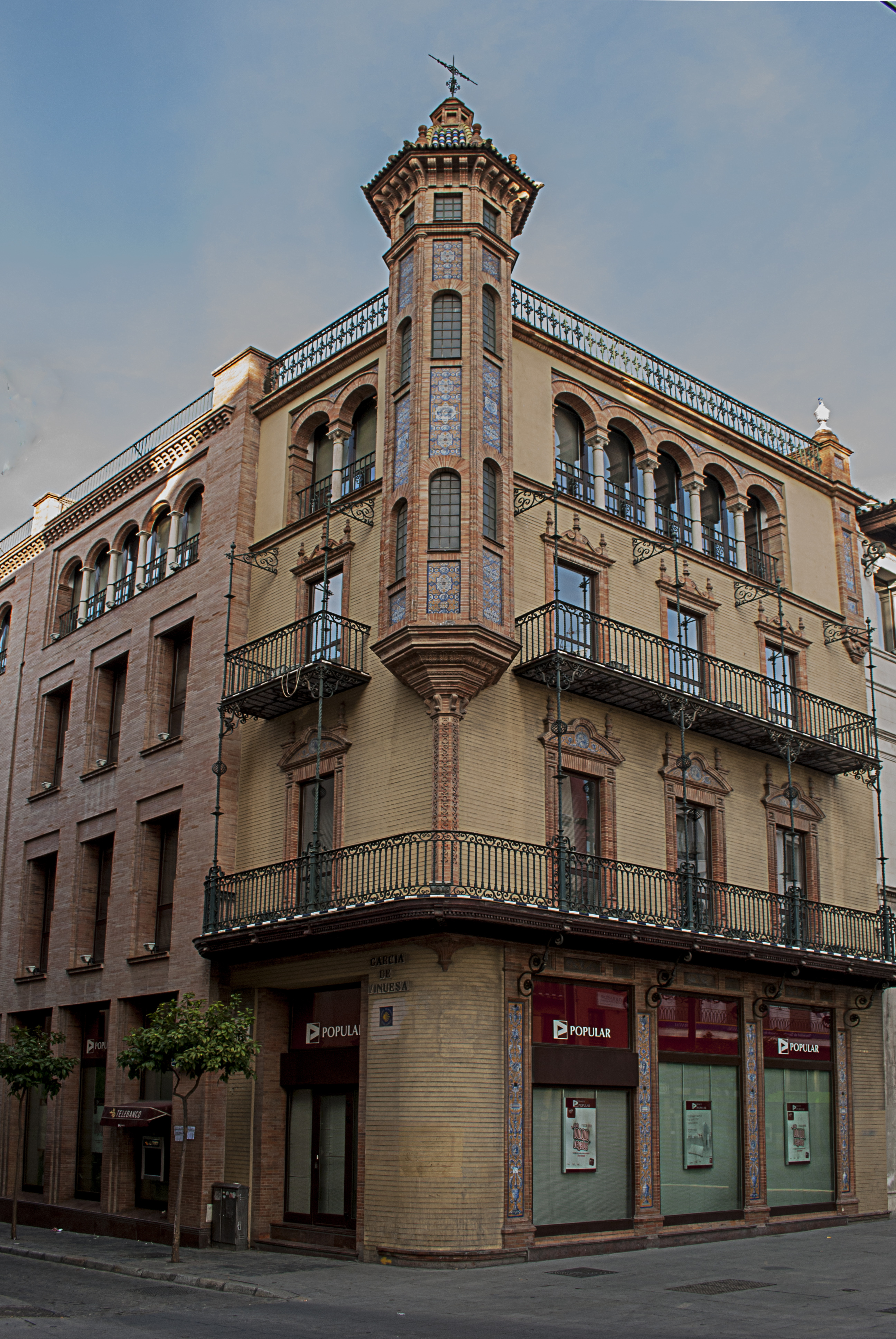 Edificio Avenida de la Constitución 18, esquina García Vinuesa. Sevilla (1915-1917) (Sede principal del Banco Popular en Sevilla). Arquitecto Aníbal González.